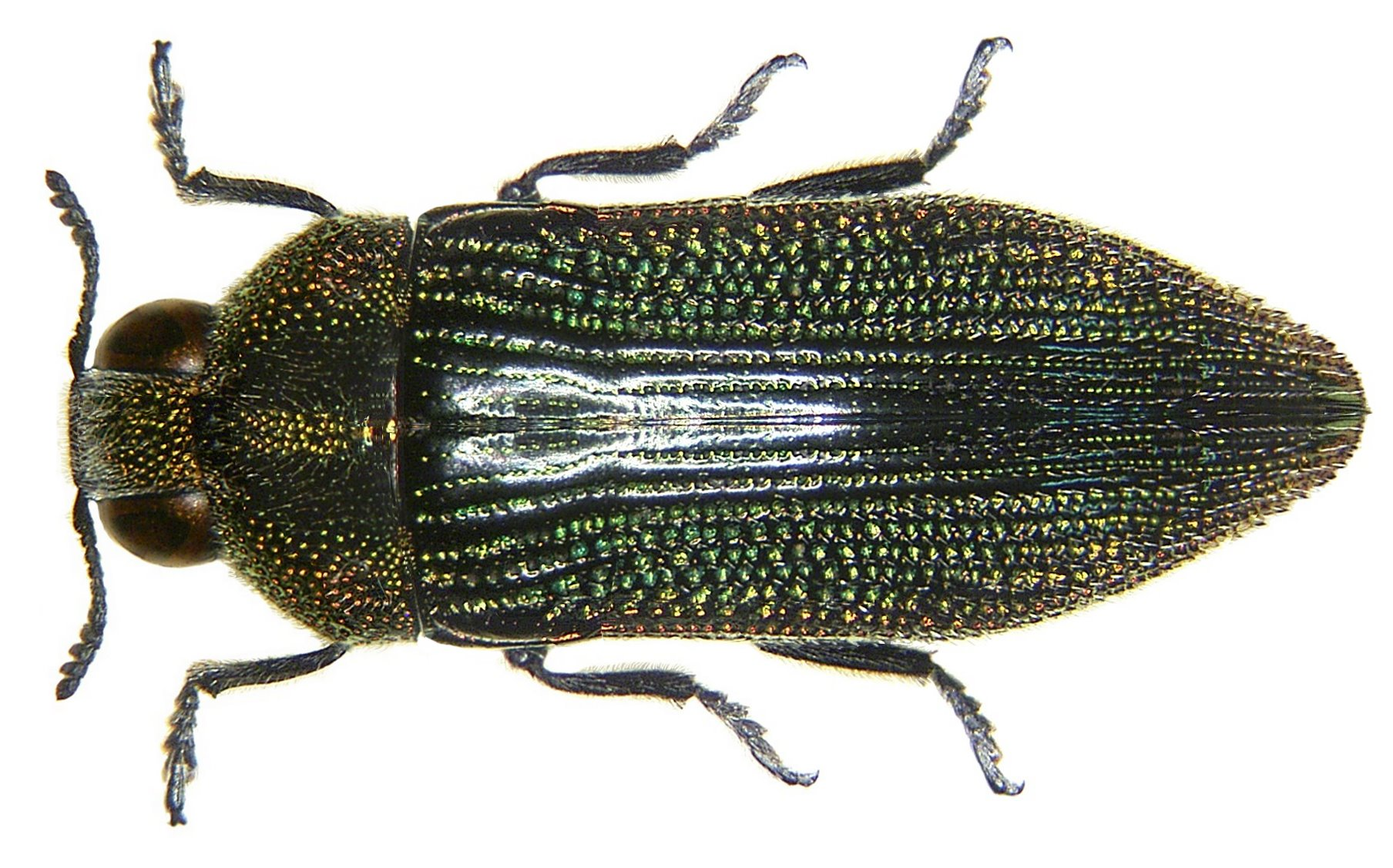 Familie: Buprestidae Groesse: 17 mm Fundort: Namibia, Windhoek, Daan Viljoen Park leg. U.Schmidt, 1994; det. Mühle Photo: U.Schmidt, 2006